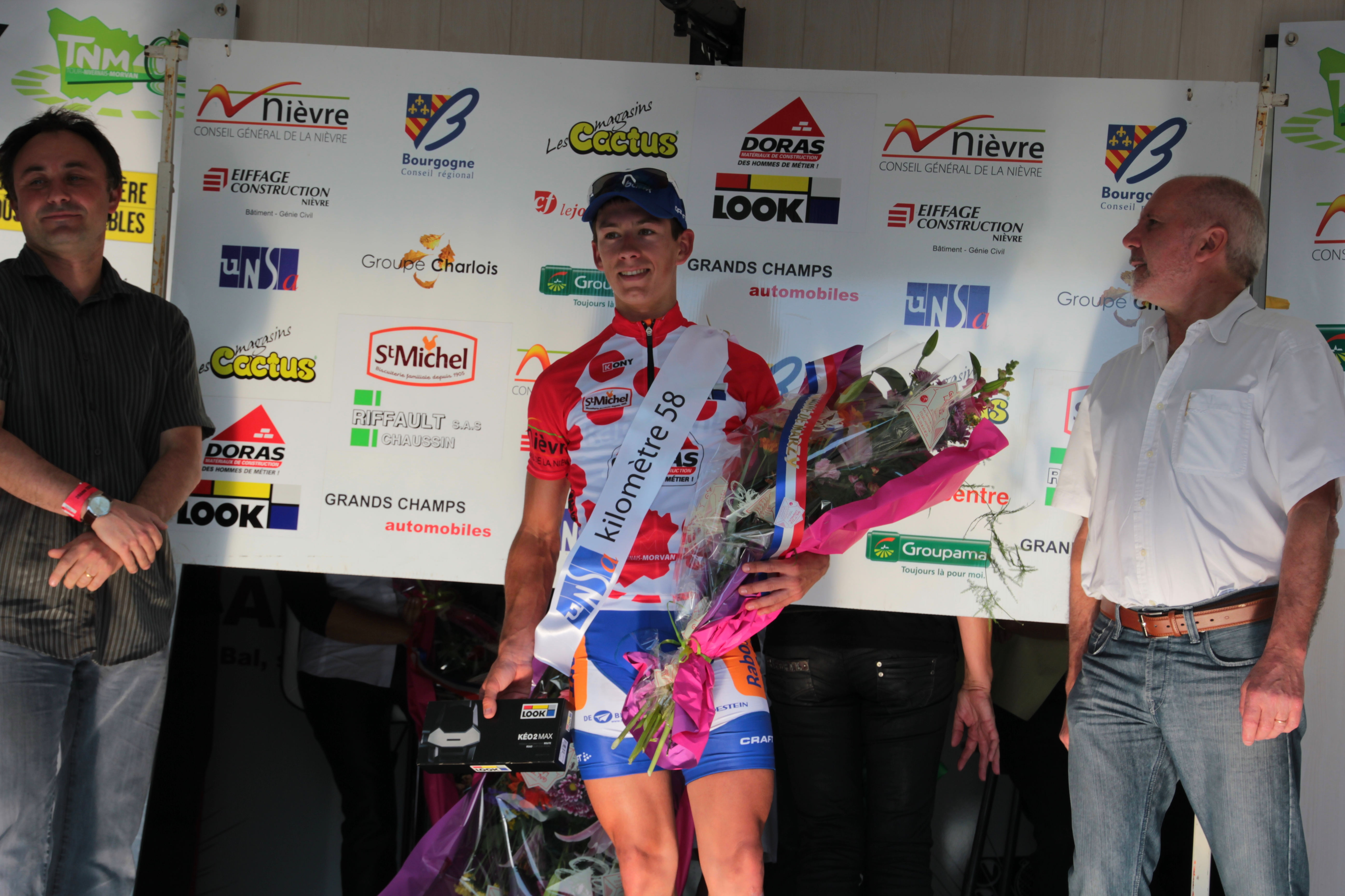 Lars Van der Haar avec le maillot de meilleur grimpeur du Tour Nivernais Morvan à l'issue de la première étape.